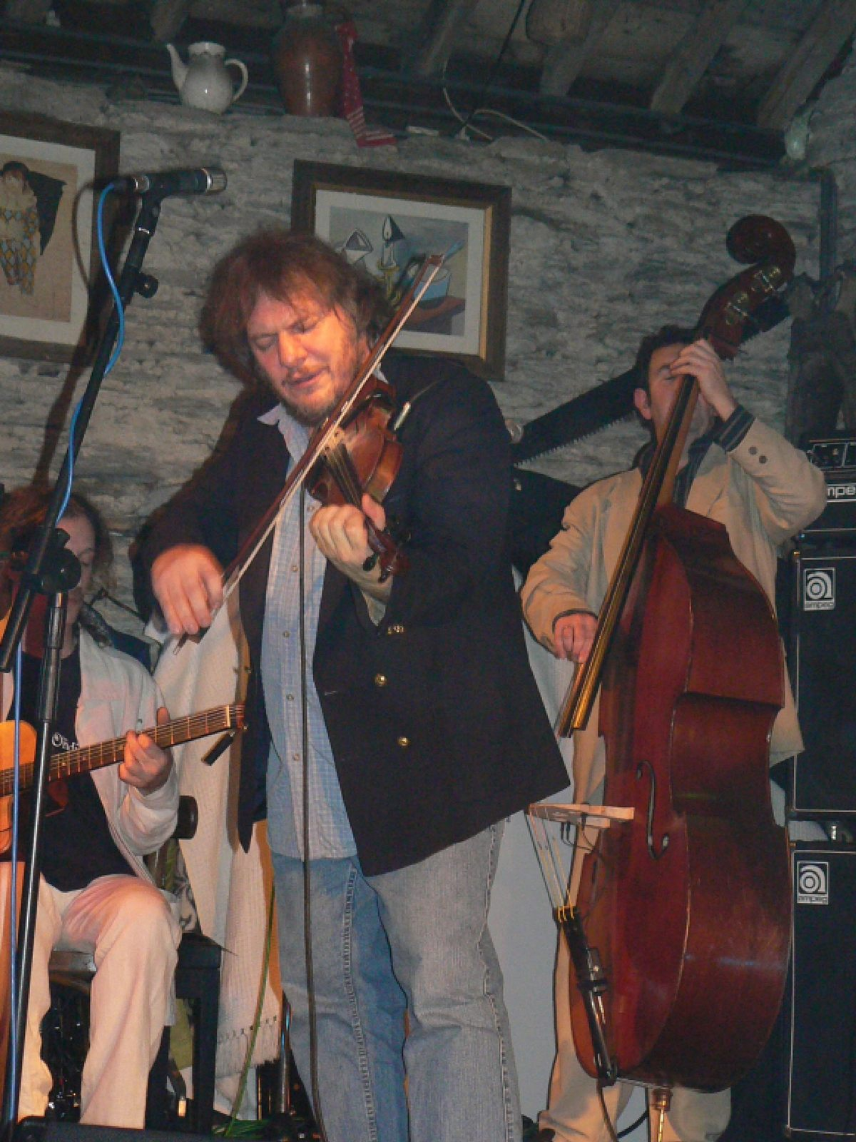 Le virtuose Yves Teicher (Belgique) à la Ferme de la Madelonne à Gouvy (Belgique) le 20 janvier 2007, dans le cadre des Djangofolllies.